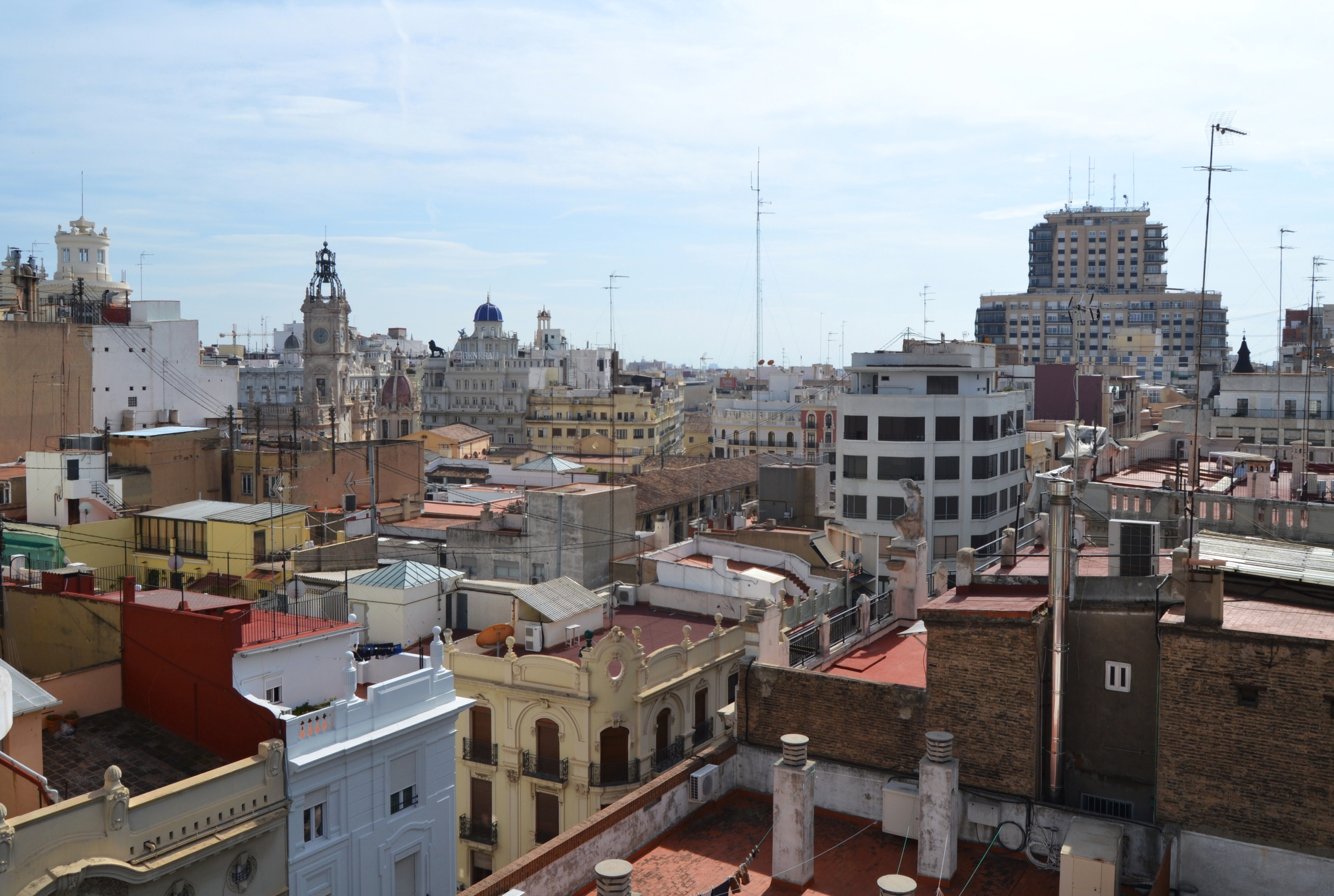 Vista de València des de l'edifici Roca.